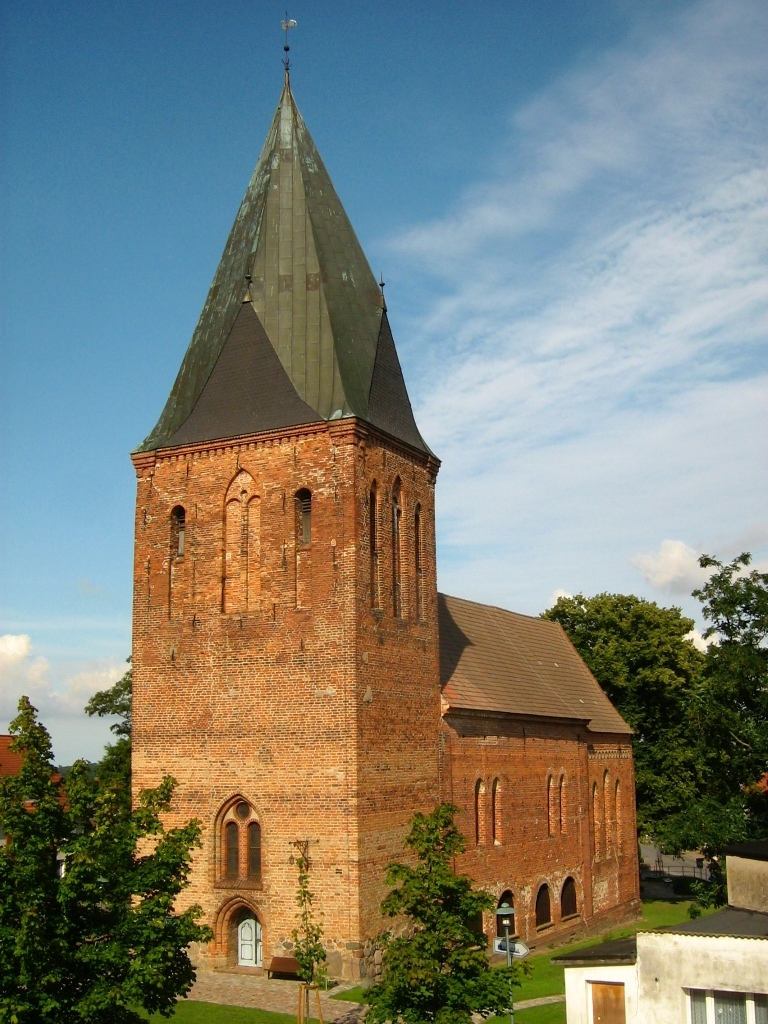 Stadtkirche in Marlow (Landkreis Vorpommern-Rügen, Mecklenburg-Vorpommern).